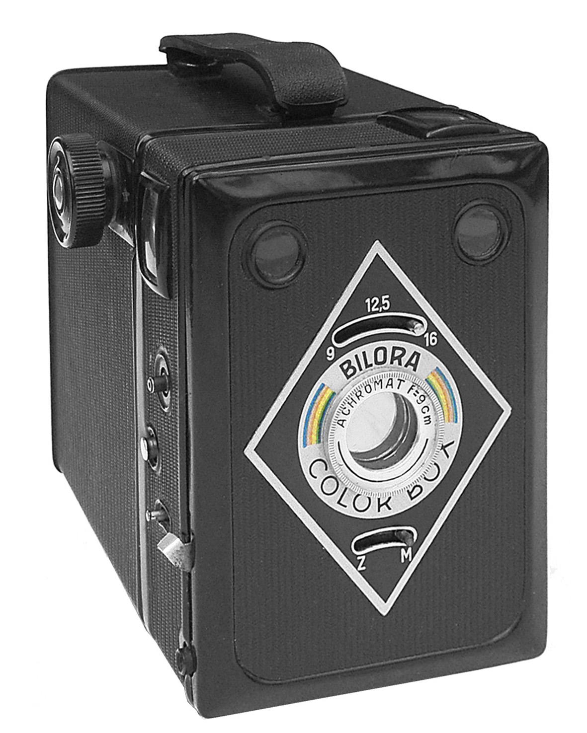 Bevor Kürbi & Niggeloh („BILORA“) die berühmte Bella herausbrachte, hatte sich die Firma schon einen recht guten Ruf als Hersteller der „Stahlbox“ erworben. In der Nachkriegszeit wurde sie - optisch leicht aufgebessert - noch ein paar Jahre weiterproduziert. Das erste neue Box-Modell (für 6x9) nach dem Krieg war aber die „Color-Box“, deren Produktion 1949 begann. Das Herausragende an ihr war das Objektiv, ein Achromat (Zweilinser) von Rodenstock (hier einer von Agfa), der als besonders geeignet für Farbaufnahmen angepriesen wurde. Den erhofften Erfolg hatte die Kamera nicht, vielleicht weil sie einfach für eine Box zu teuer war: 22,- DM. Die Produktion lief 1953 aus. Technisch war sie recht gut ausgestattet: Außer dem Achromaten hatte sie Drahtauslöser- und Blitzanschluß, Abblendmöglichkeit auf 12,5 und 16 (Lamellen, keine Lochblende!) und zwei Zeiten: „Z“ und „M“.